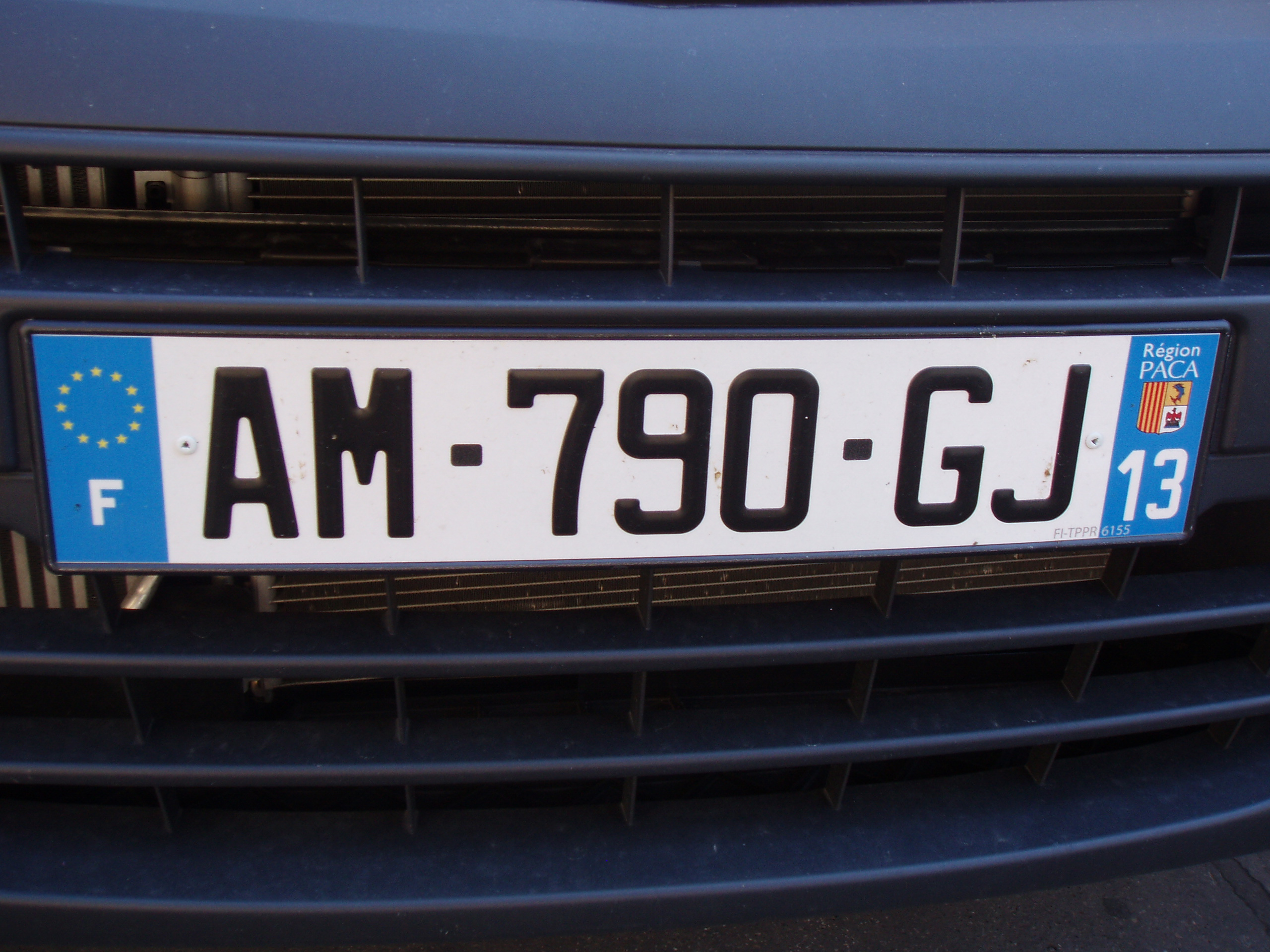 Plaque d´inmatriculation française